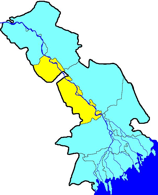 Енотаевский район на карте Астраханской области